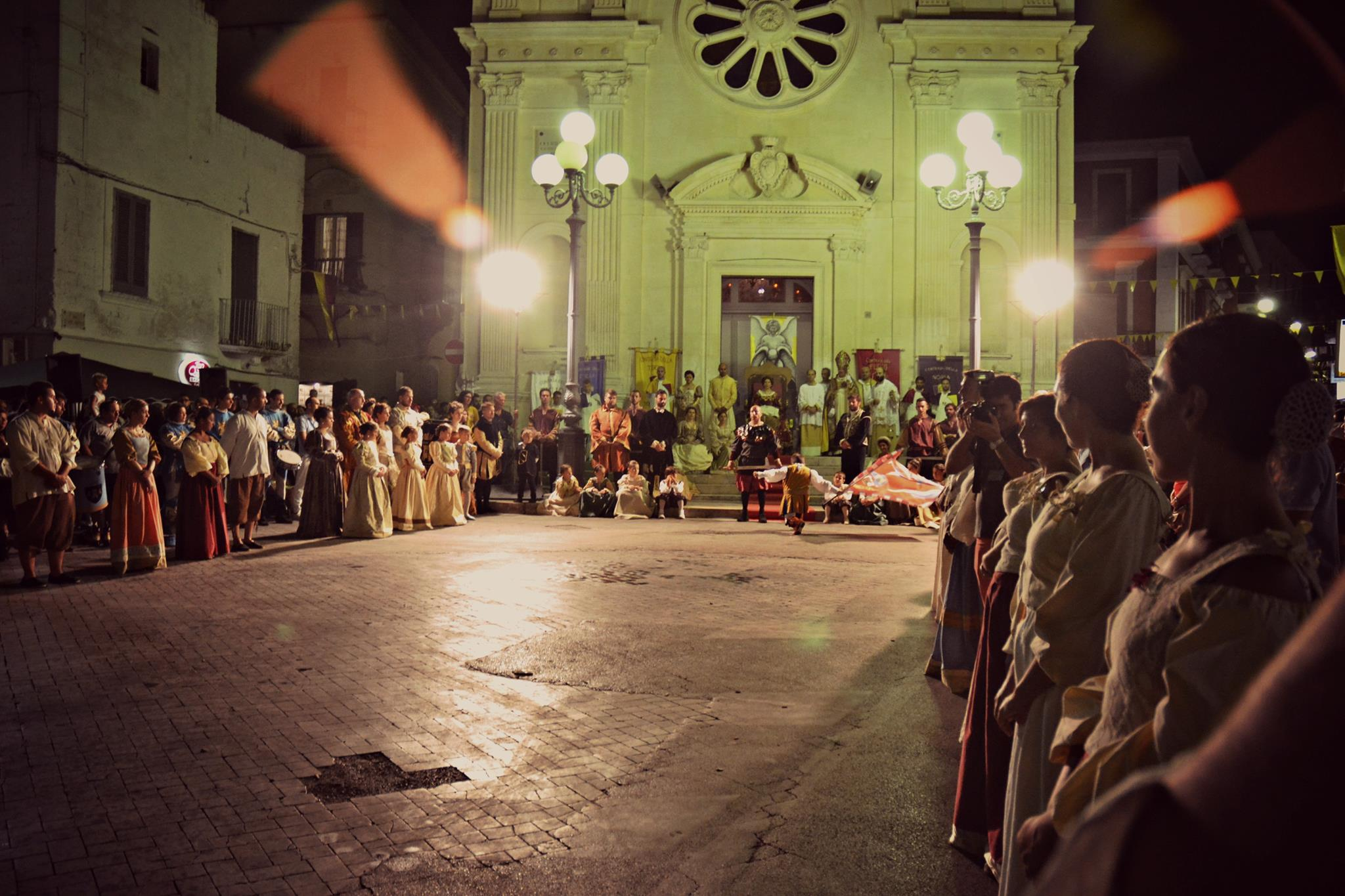 Corteo Storico Palio dei Capatosta - Mola di Bari